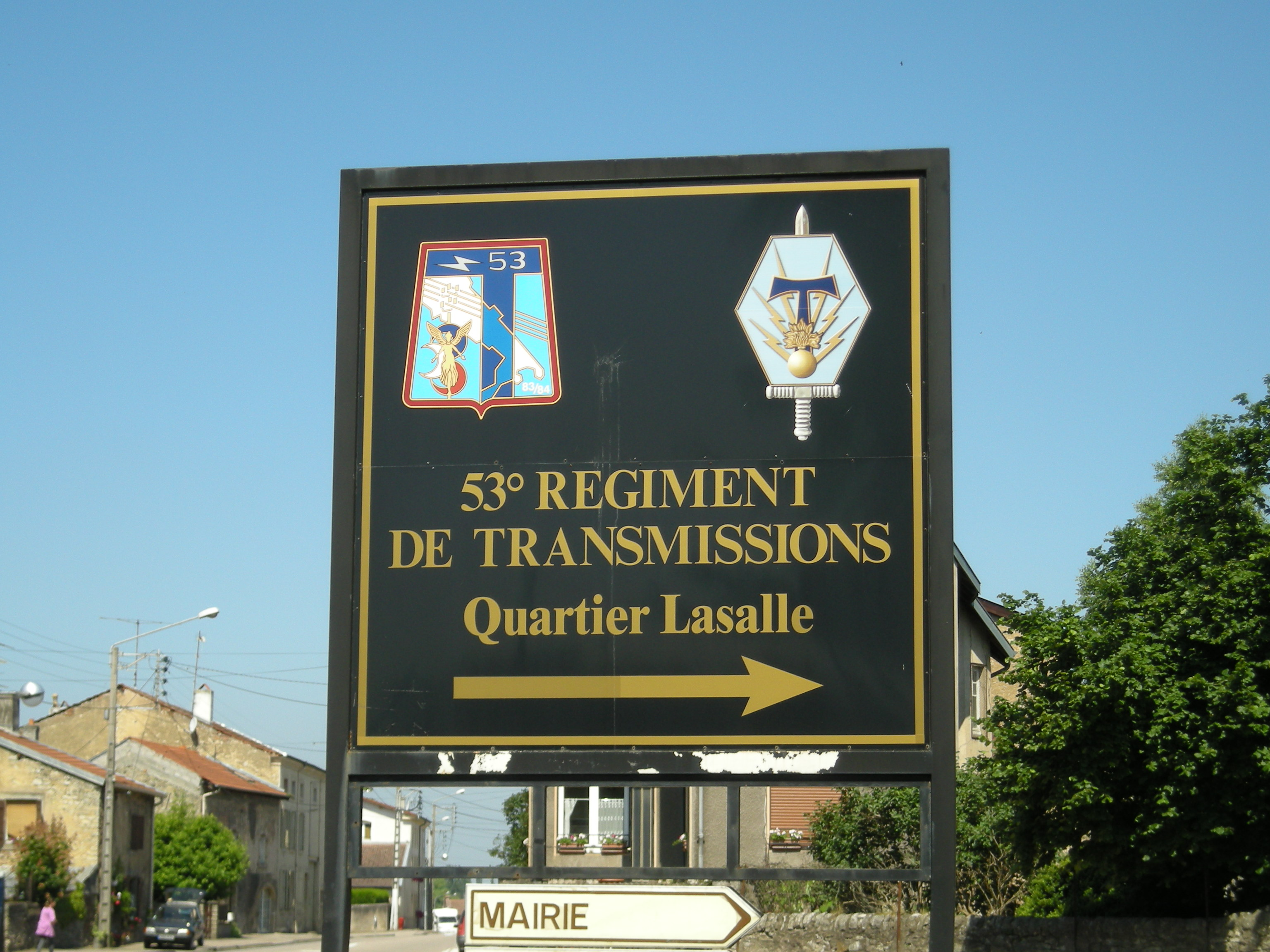 53e Régiment de Transmissions entre Saint-Clément et Chenevières (Meurthe-et-Moselle). Quartier Lasalle.